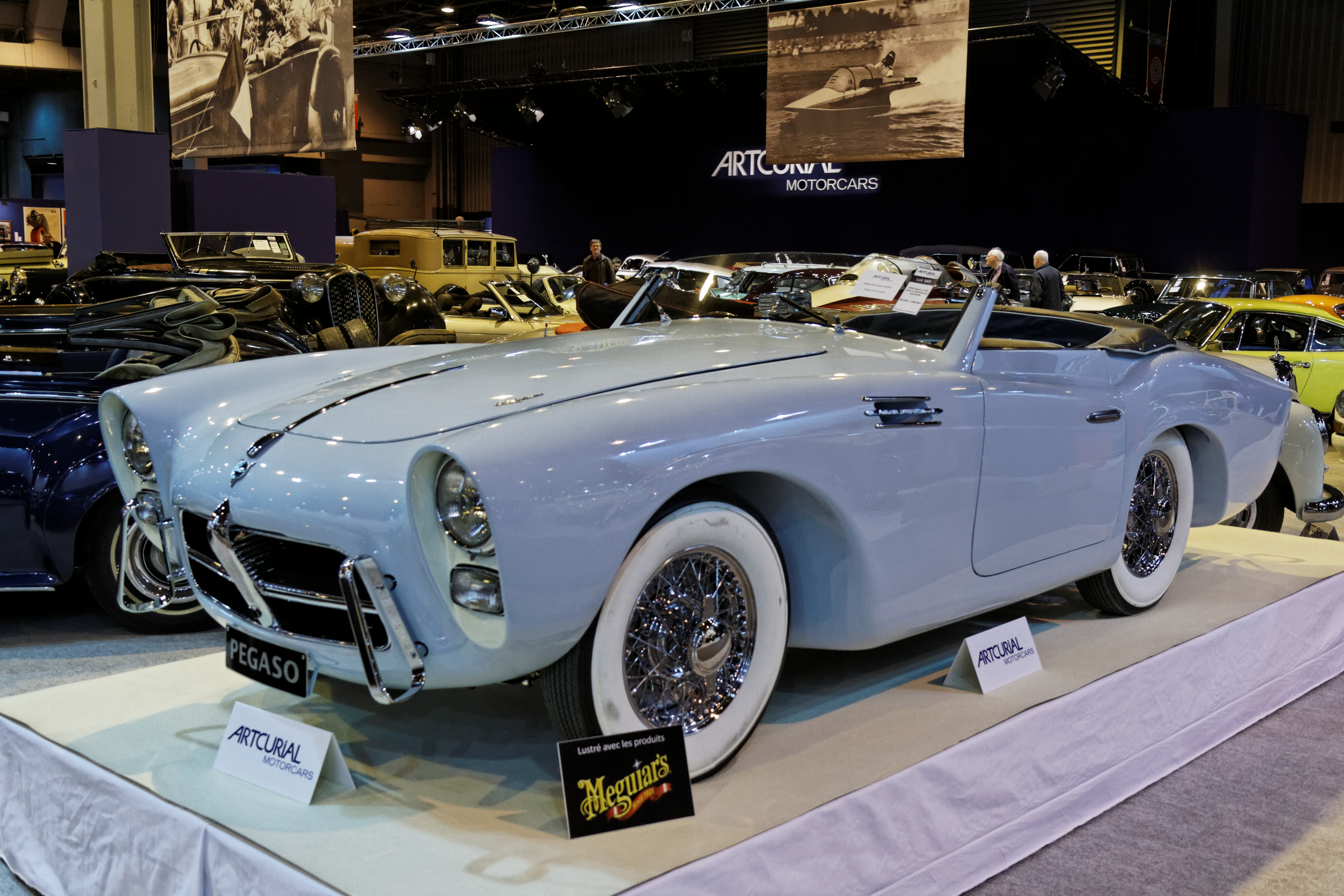 Une Pegaso Z-102 Cabriolet Saoutchik Série 2 exposée lors du salon Retromobile 2014